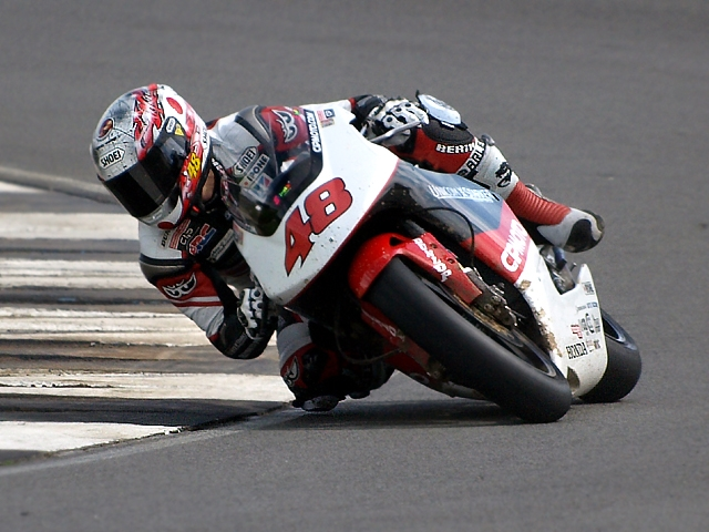 MotoGP 250cc CIP Moto - GP250